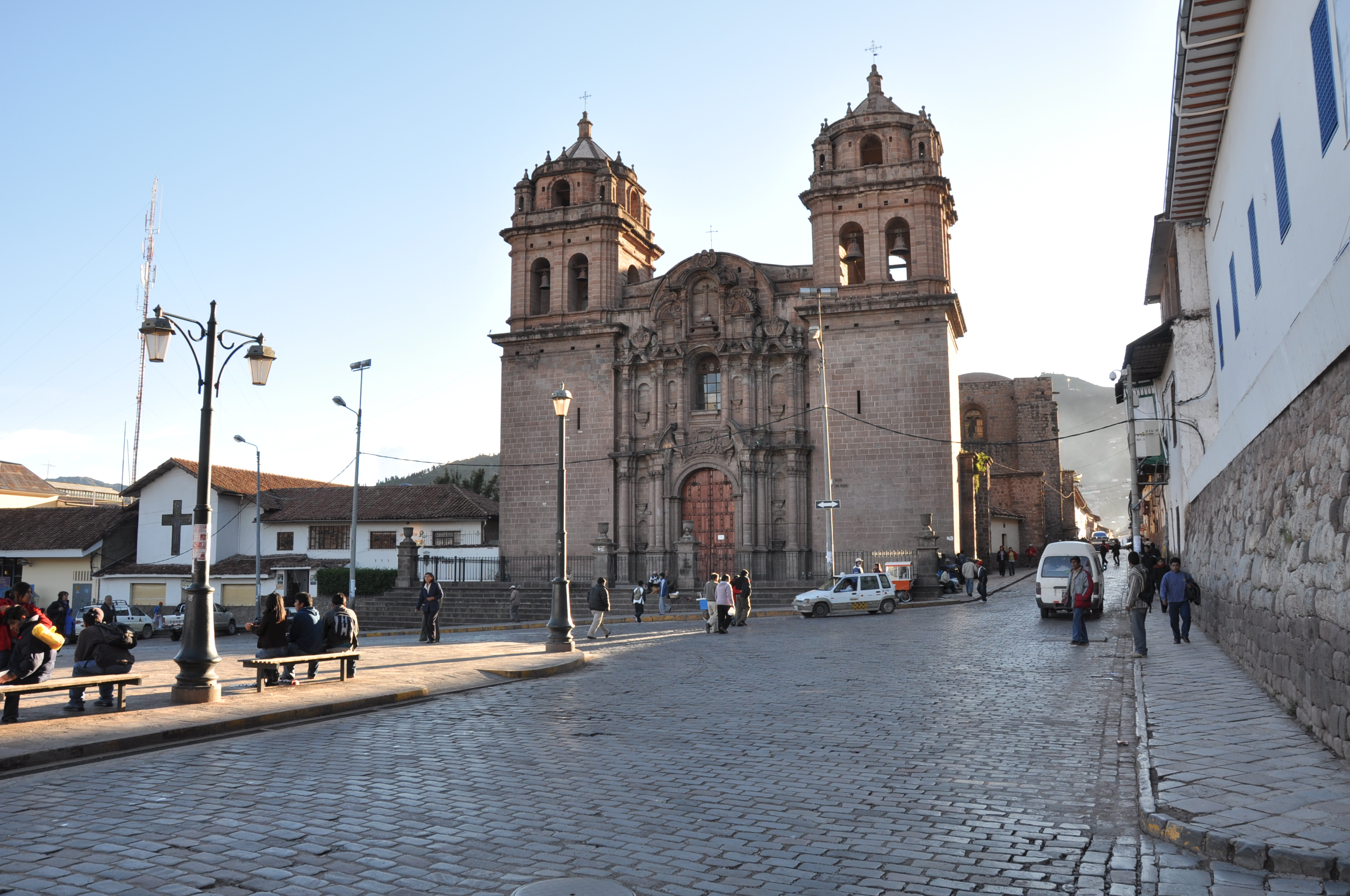 Iglesia de San Pedro (Cuzco)